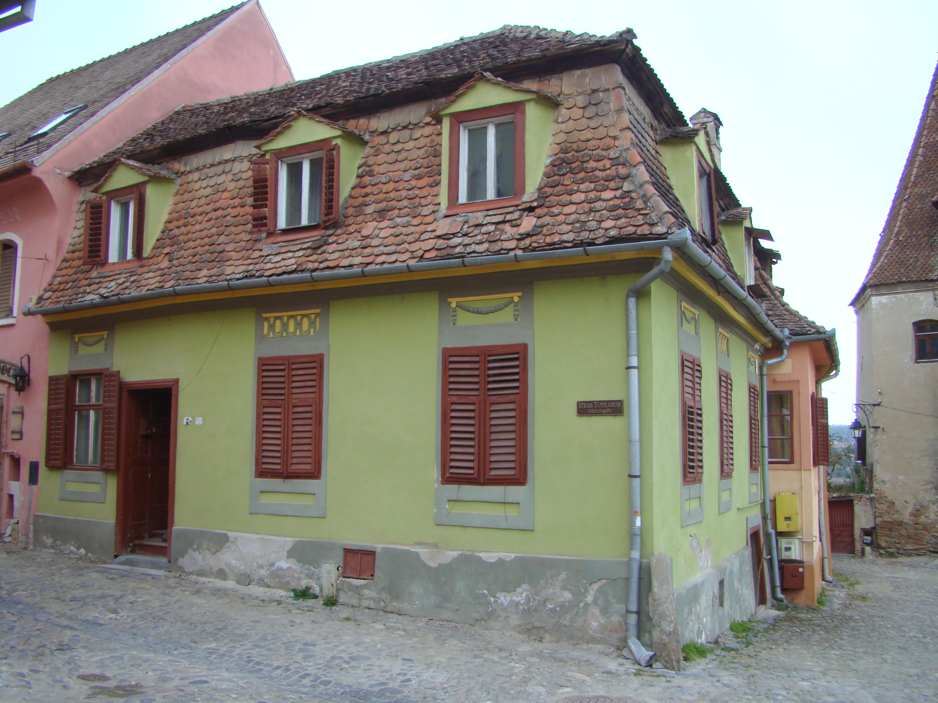 Casă, municipiul Sighișoara, str. Tâmplarilor 2 1600 - 1625, 1700 - 1730, ext. cca. 1930